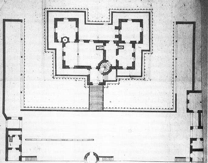 der so genannte Renaissanceplan Jagdschloss Grunewald Berlin